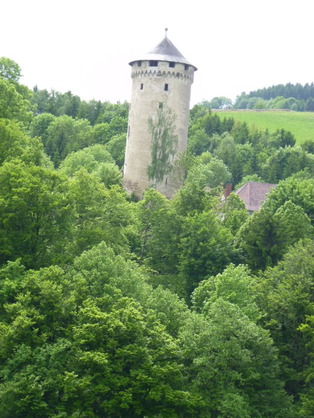 Wildberg im Sommer